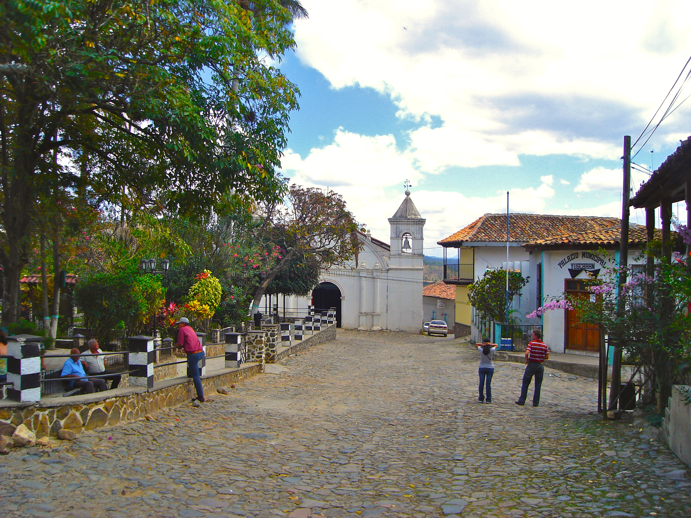 Central square of Yuscarán, Honduras